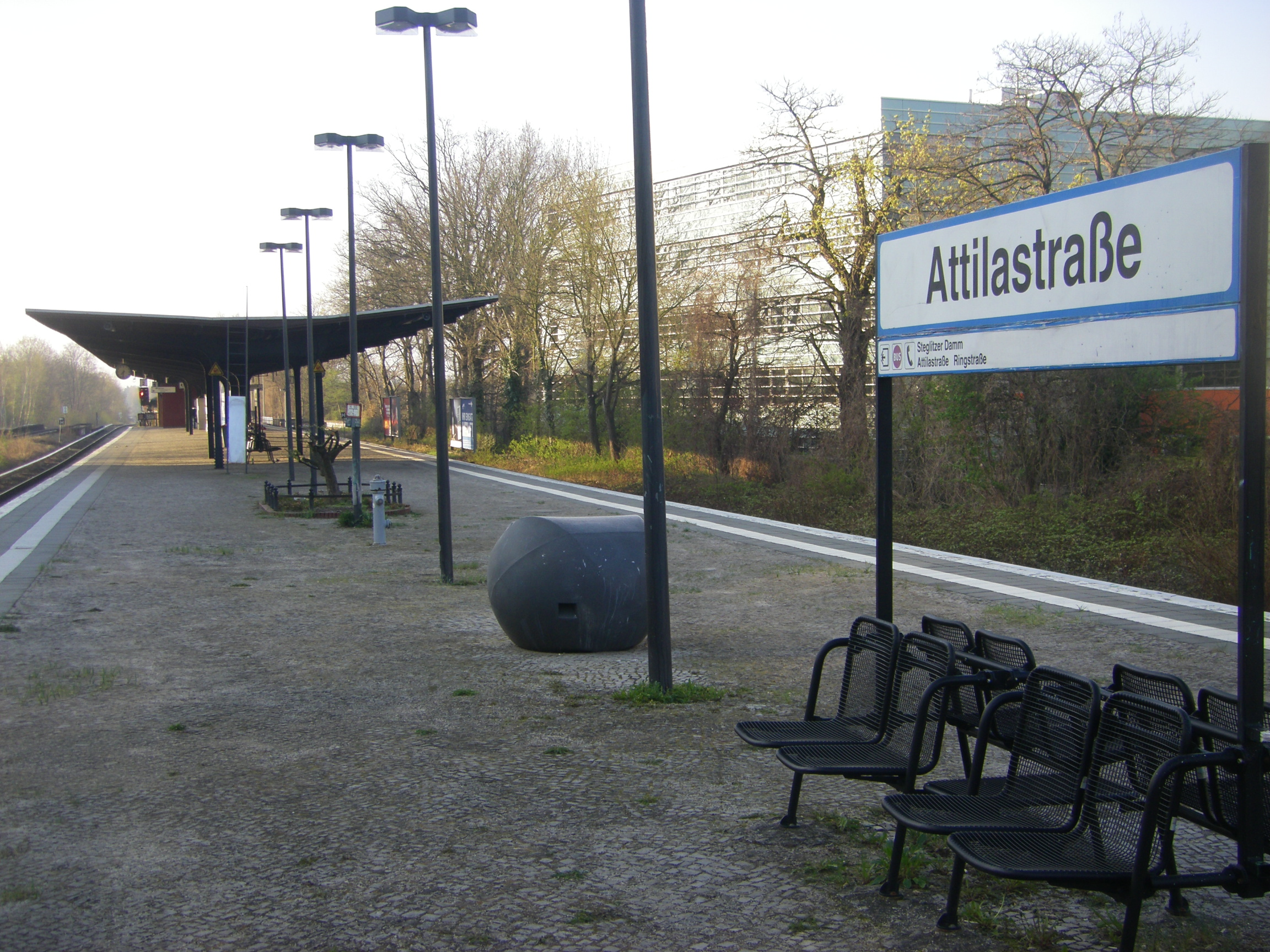 S-Bahnhof Attilastraße hinterer Bahnsteigteil